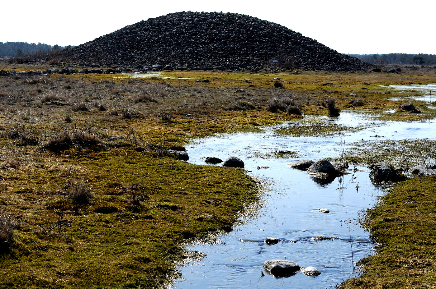 Stort röse på hed.